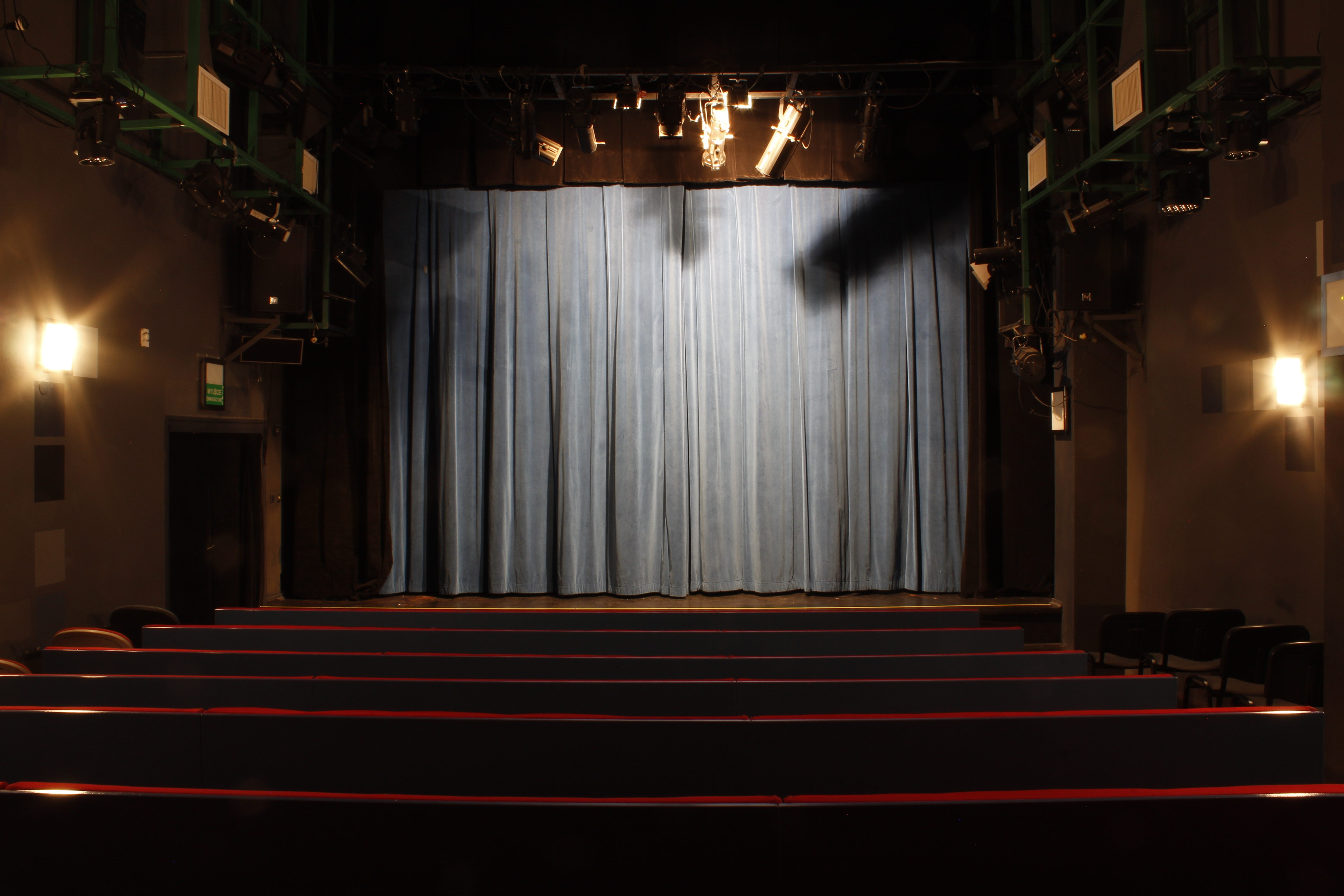 Widownia Teatru Lalki i Aktora w Łomży